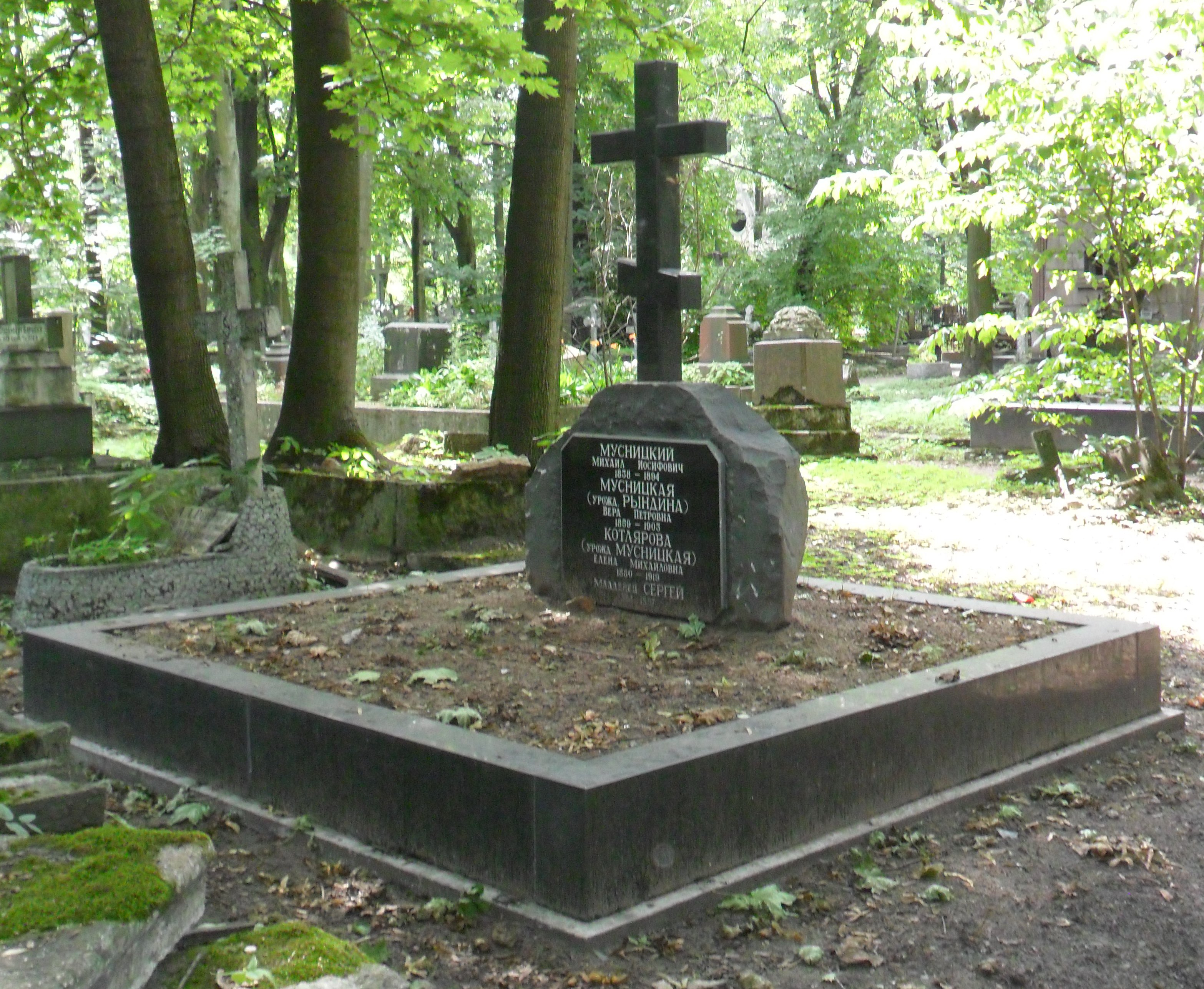 Могила Михаил Иосифович Мусницкого на кладбище Новодевичьего монастыря в Санкт-Петербурге